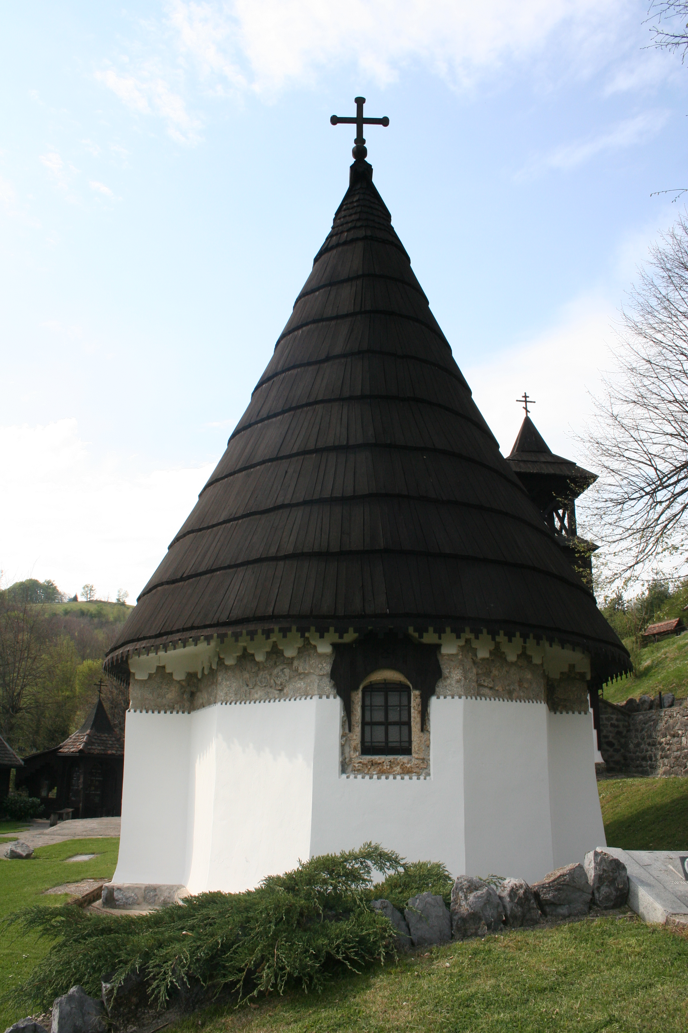 Crkva Uspenja Presvete Bogorodice, Dobri potok Krupanj